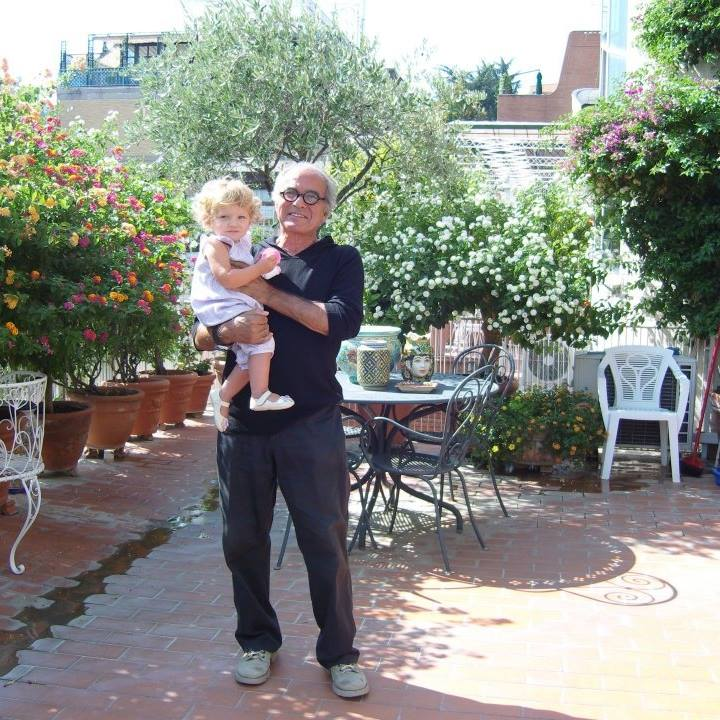 Stefano Munafò con la nipotina Tai, sul terrazzo di casa. Estate 2017